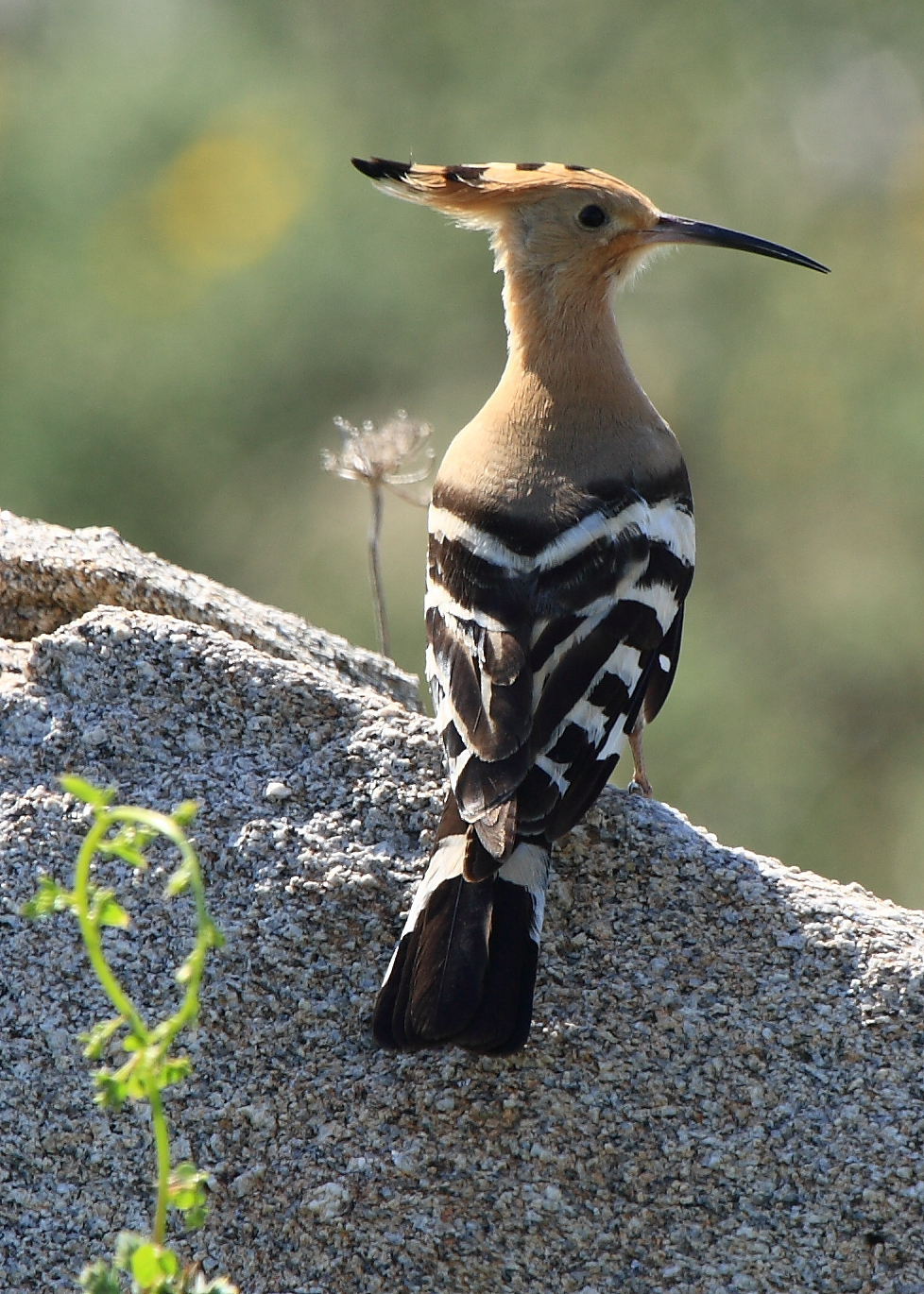 Es la tercera que vi por la zona,... pero son aves muy desconfiadas,.. no se dejan acercar mucho